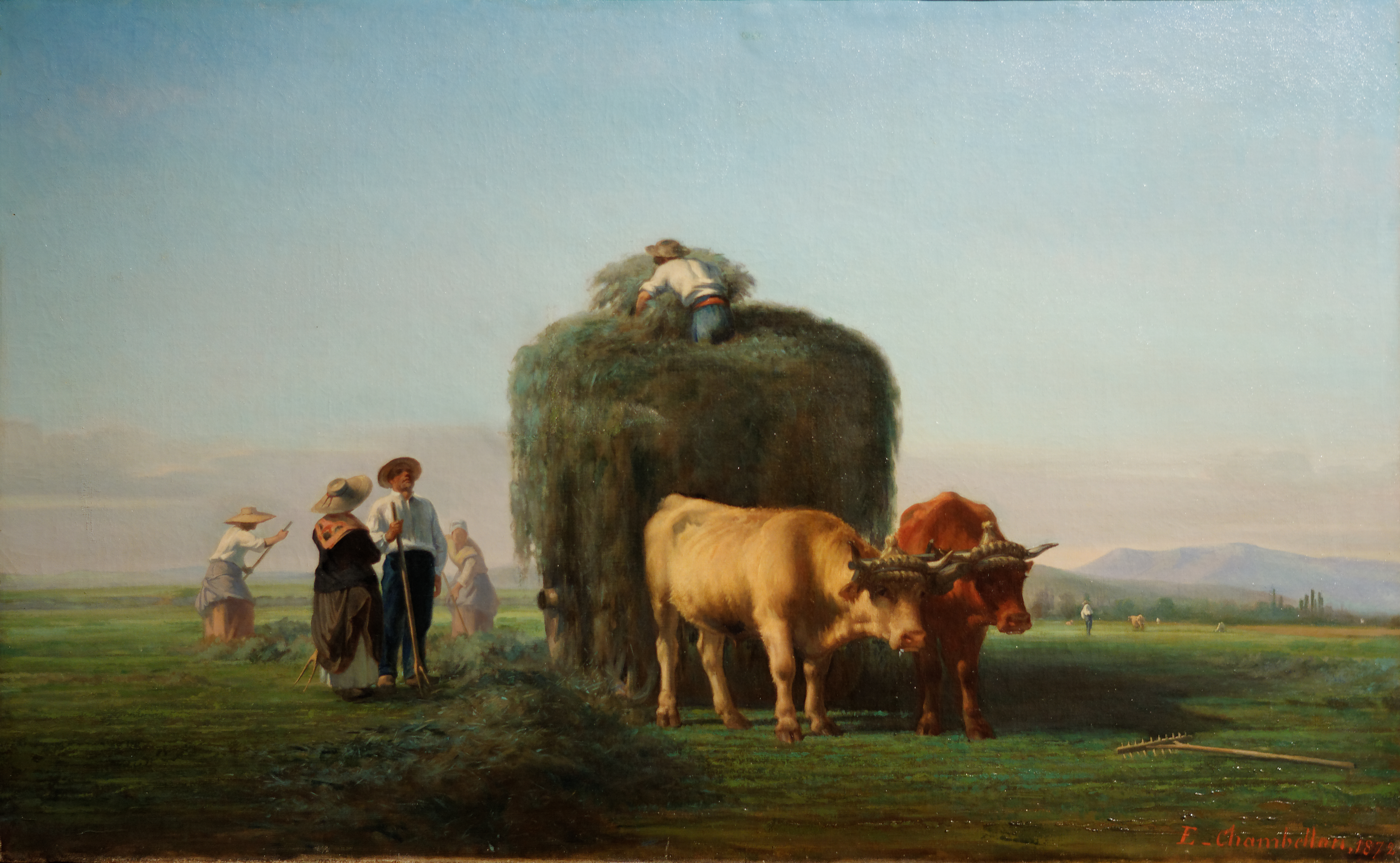 La récolte des foins dans le Charolais, Eugène Chambellan 1872. S.D.b.d "E.Chambellan 1872". Huile sur toile 80 x 121 cm. Acquis en 1895. Musée des Ursulines de Mâcon. Inv A384